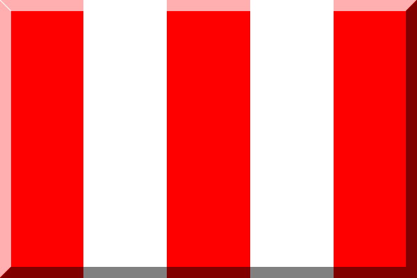 600px Rosso e Bianco (strisce)